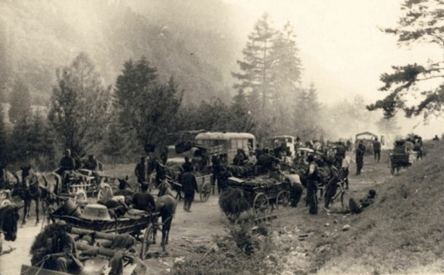 Begunci na poti na Koroško. Begunci v okolici Celja maja 1945.